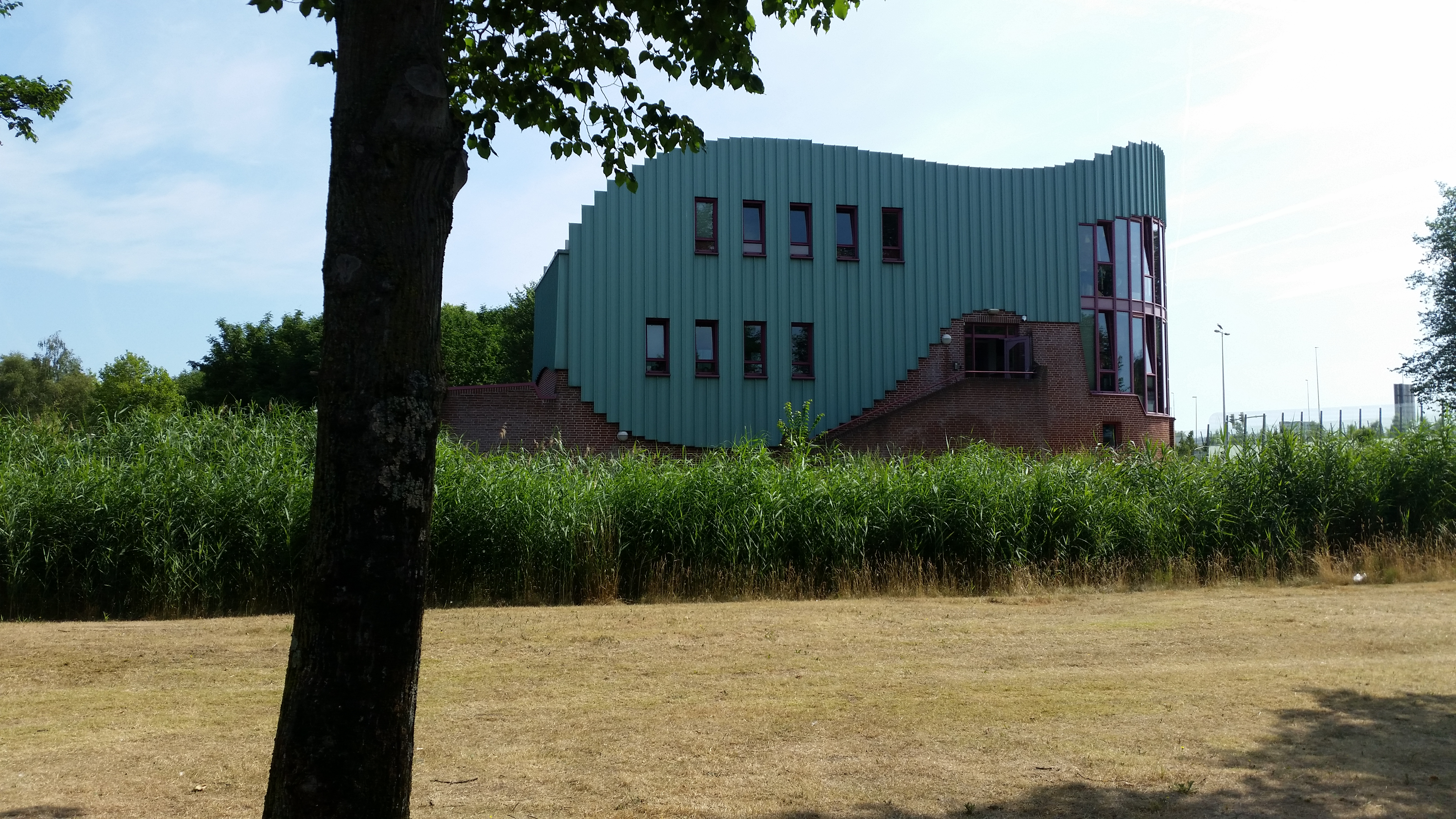 Voorlandpad 2, Amsterdam, Dierenuitvaartcentrum en centrale Dierenambulance Amsterdam, gebouwd naar ontwerp van Architectenbureau Alberts en Huut